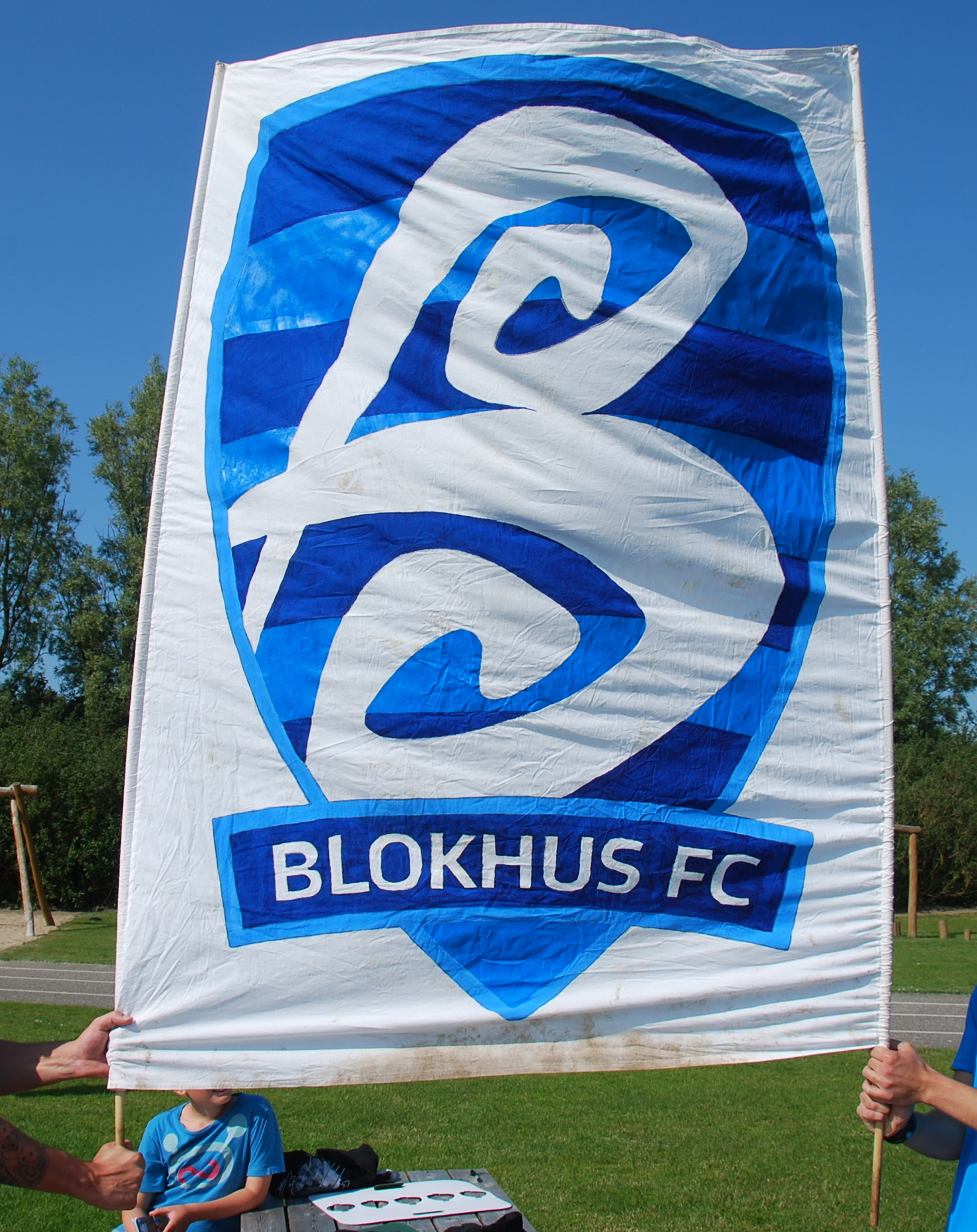 Banner med logoet for fodboldklubben Blokhus FC.